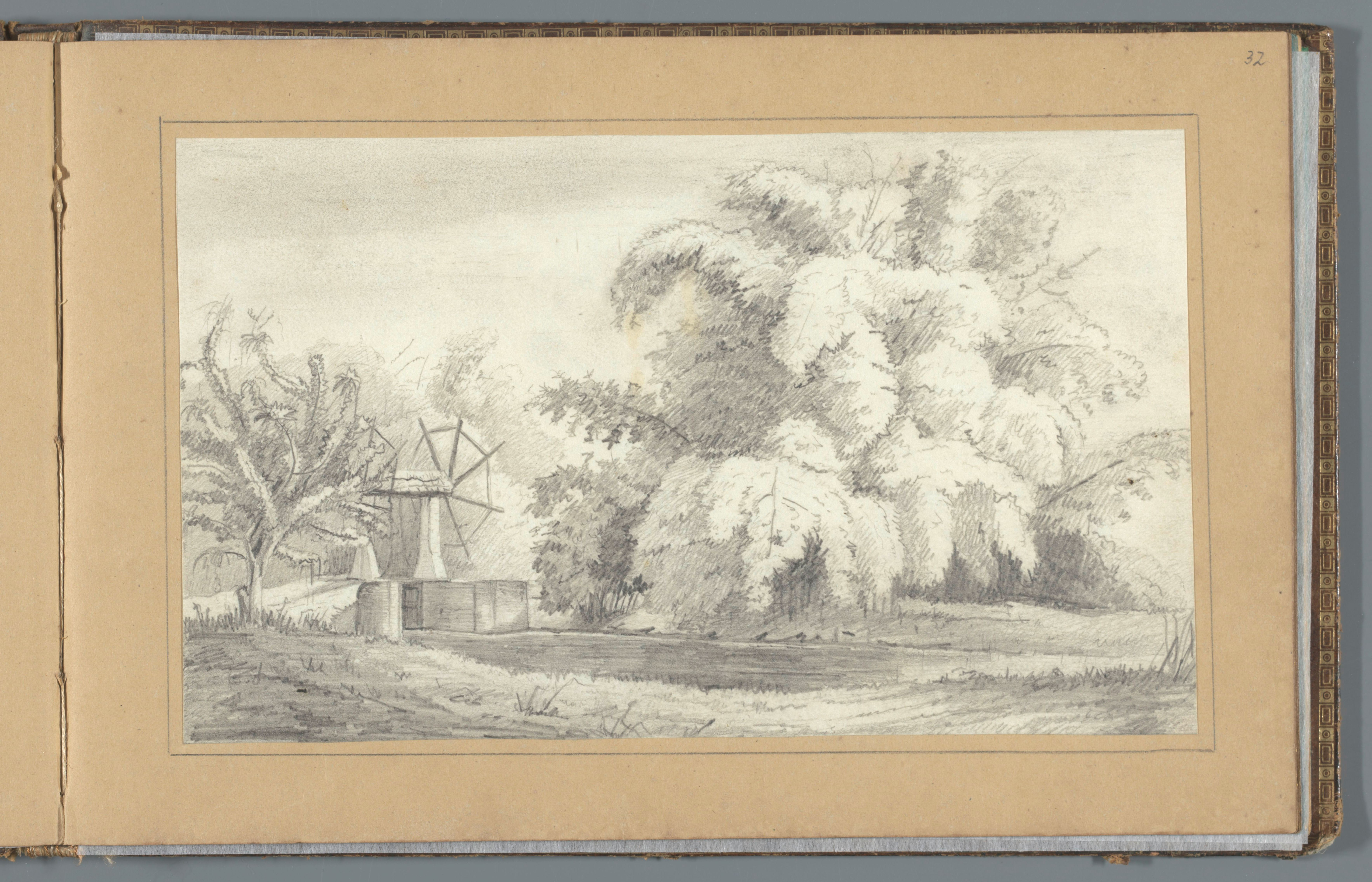 IdentificatieTitel(s): De sluis van plantage Ellen aan de Commewijne rivierDe sluis op plant. Ellen Oct 2/52 (titel op object)Album met tekeningen van Suriname, p.32 (50) (serietitel)Objecttype: albumblad topografische tekening Objectnummer: RP-T-1994-281-24Opschriften / Merken: inscriptie: ‘.’VervaardigingVervaardiger: tekenaar: Jacob Marius Adriaan Martini van GeffenPlaats vervaardiging: SurinameDatering: 2-okt-1852Fysieke kenmerken: potloodMateriaal: papier potlood Afmetingen: album: h 170 mm × b 260 mm × d 20 mmOnderwerpWat: sluice, weirWaar: SurinamePlantage Eelen sluisVerwerving en rechtenVerwerving: aankoop 1994Copyright: Publiek domein